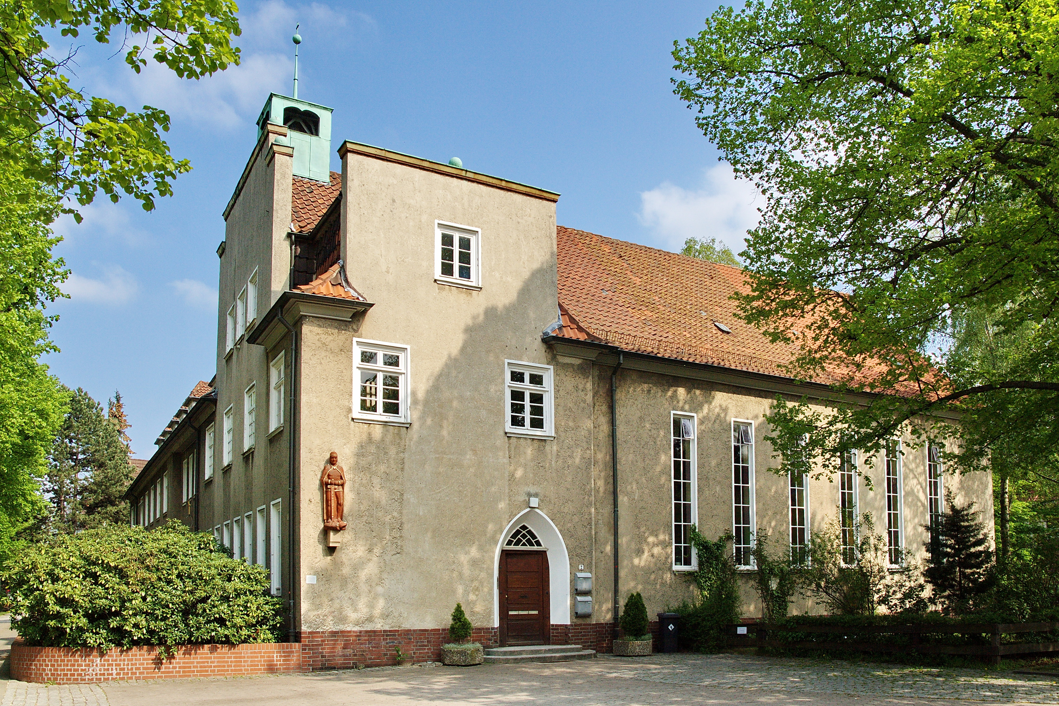 Friedenskirche im Zooviertel Hannover, Niedersachsen, Deutschland